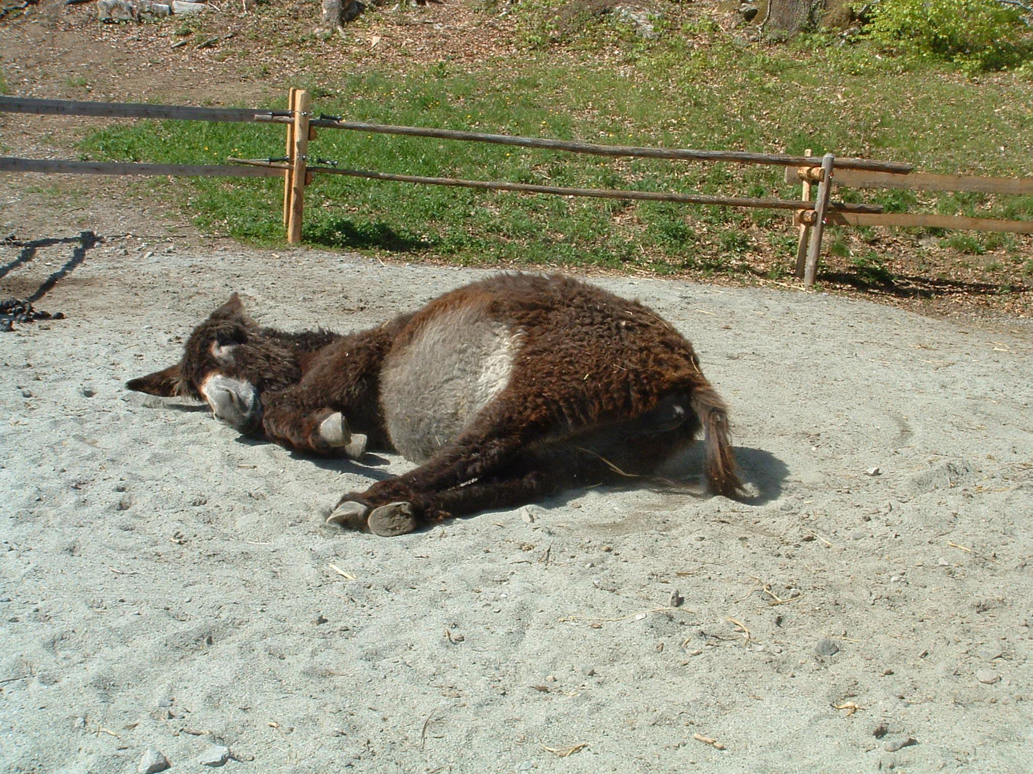 Ane se roulant dans la poussière au Musée suisse de l'habitat rural du Ballenberg, Suisse